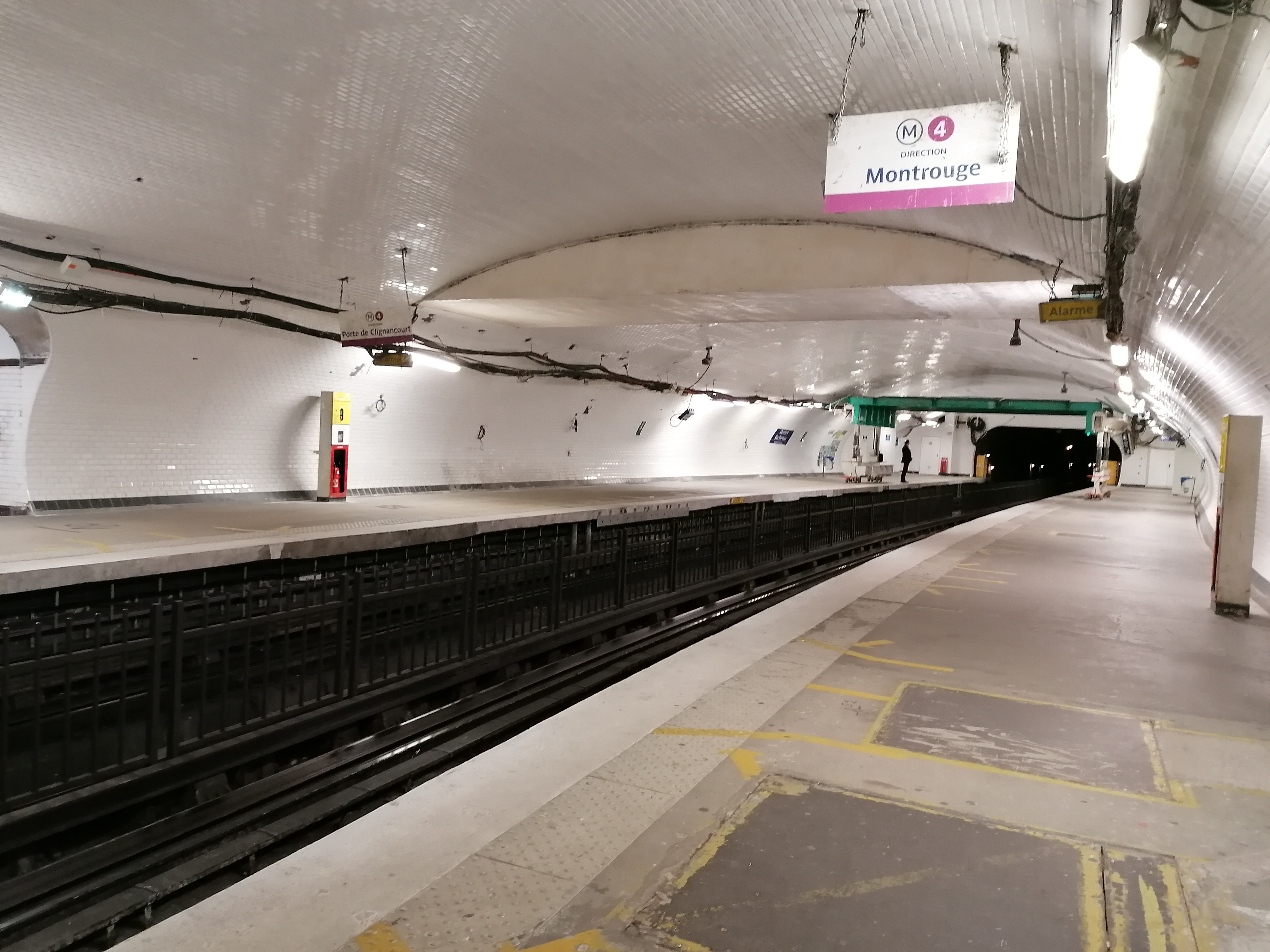 Vue de la station de métro Denfert-Rochereau déserte lors du confinement COVID-19, mars 2020. Photo prise dans le cadre d'un déplacement autorisé (milieu médical)